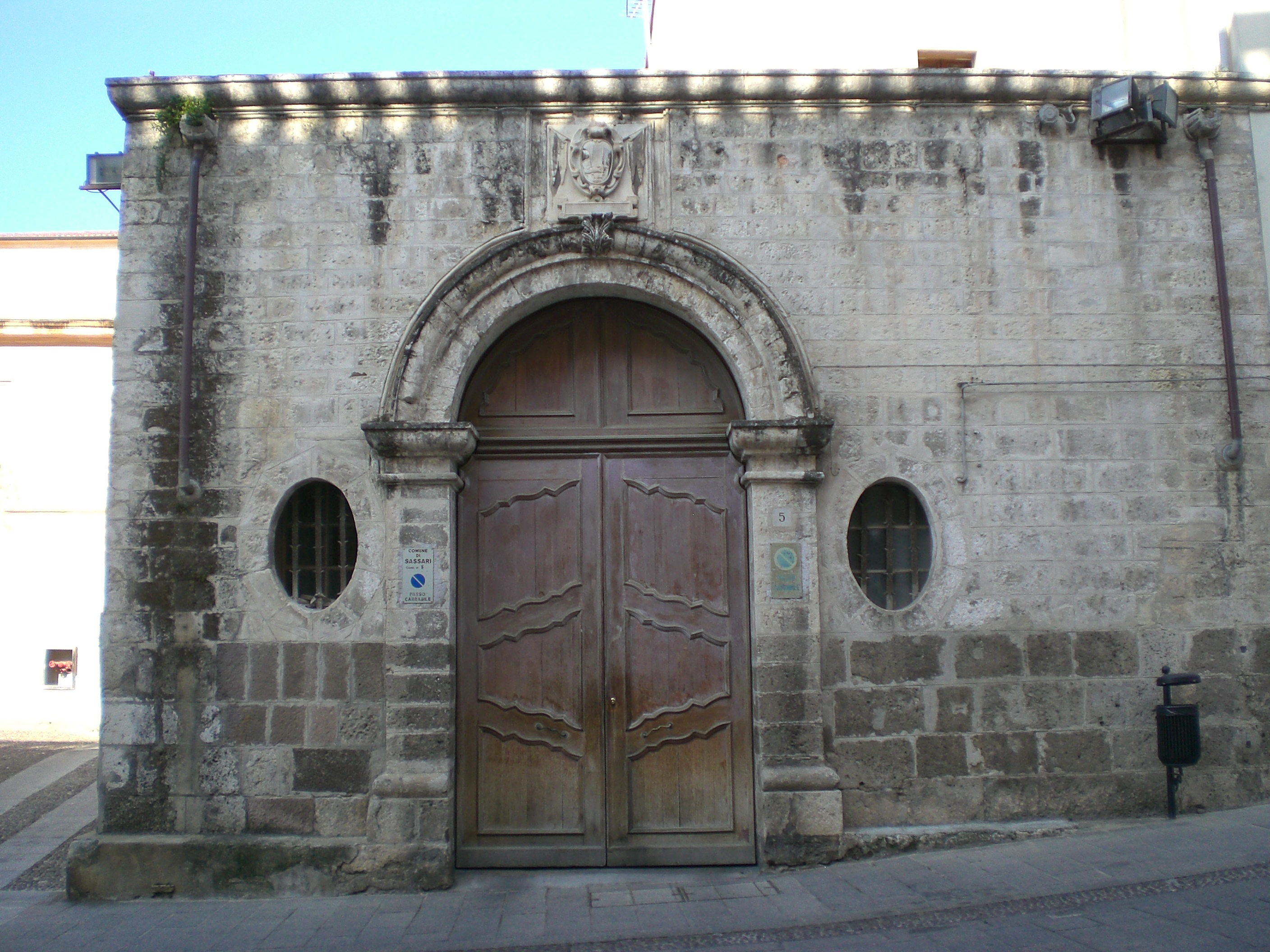 Sassari - Palazzo Ducale - La cavalleria